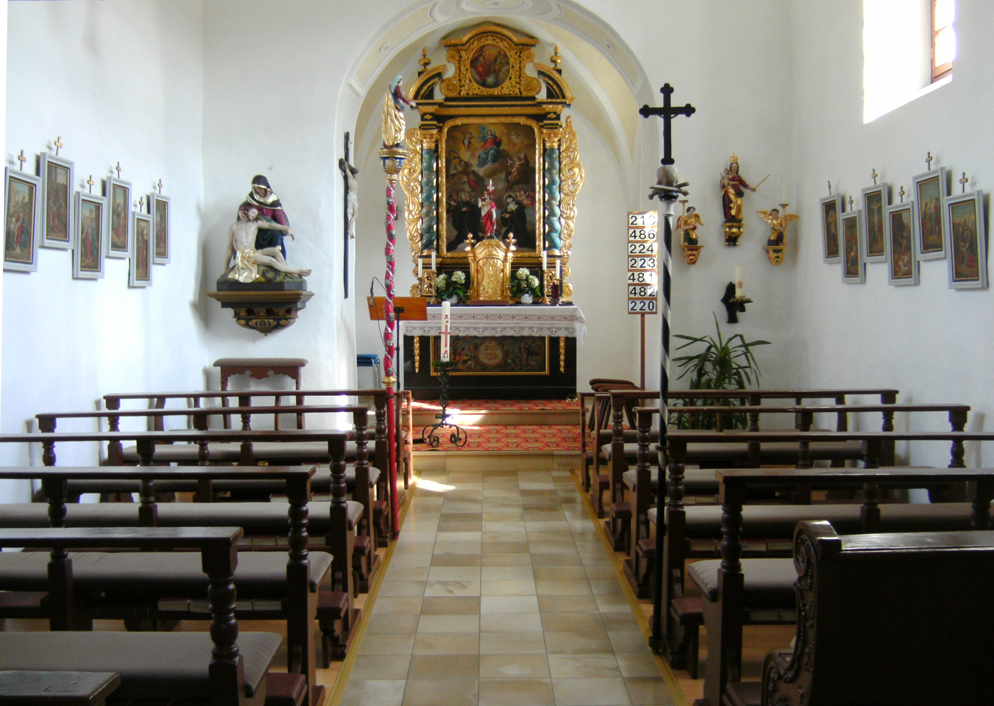 Echenzell, Gemeinde Wettstetten, Landkreis Eichstätt, Kirche St. Ägidius, Inneres